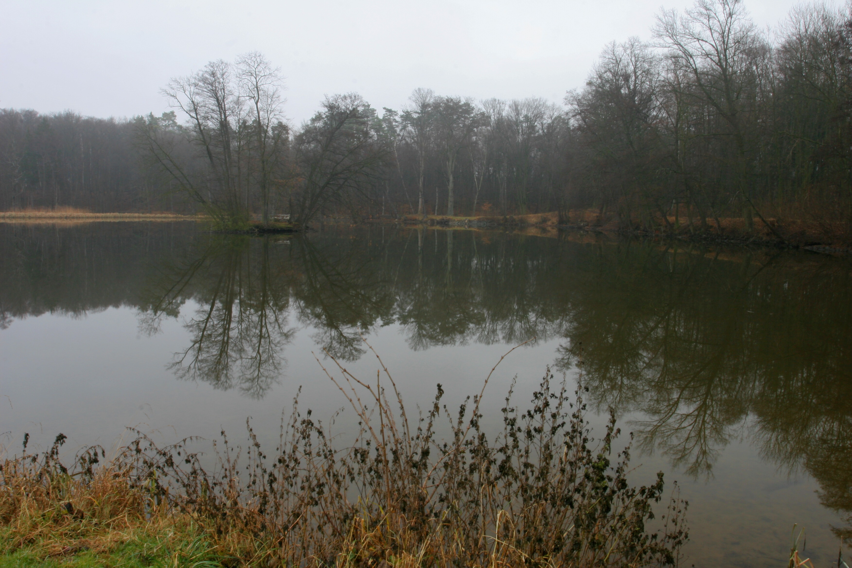 Chrtnický rybník v Choltické oboře